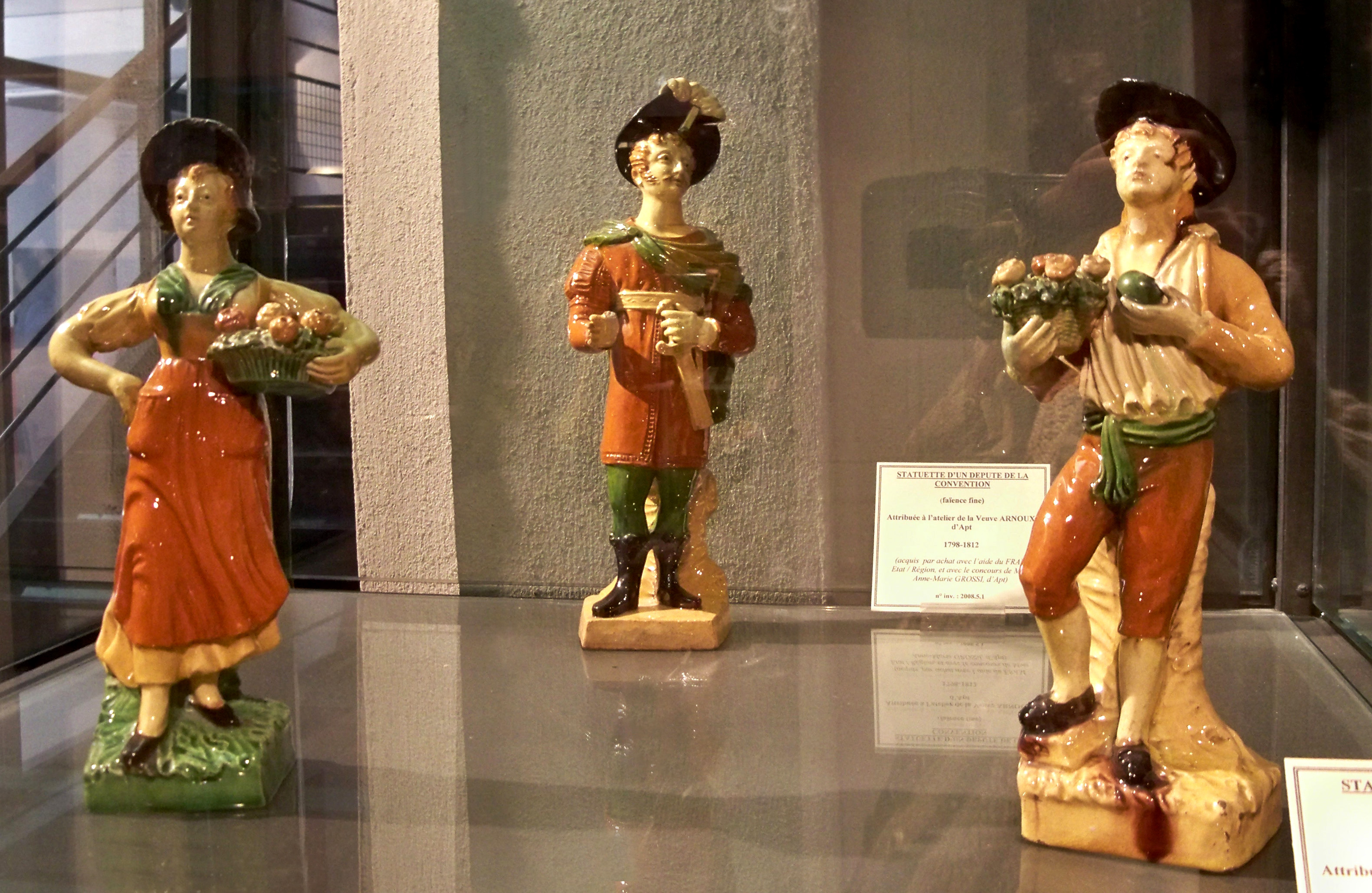 sujets en faience d'Apt (84)